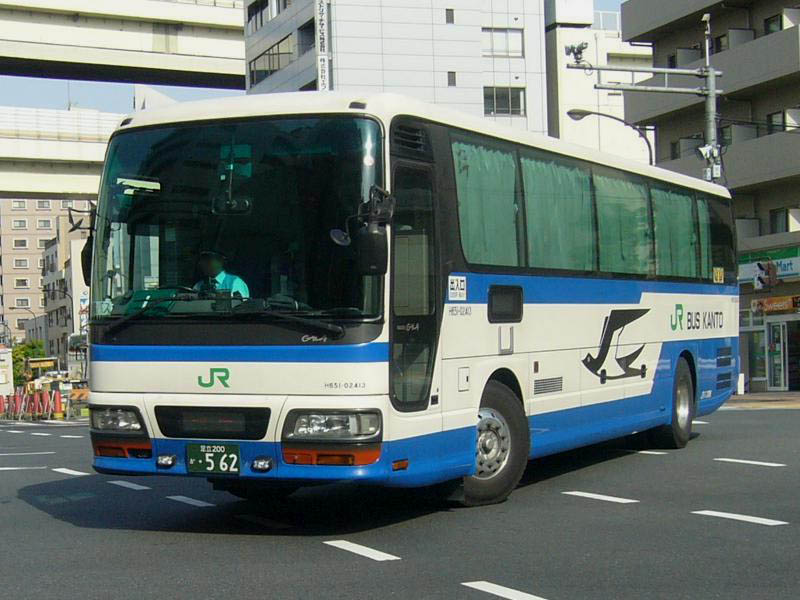 登録番号： 足立200か・562 ジェイアールバス関東(JR Bus Kanto)所属 car no.車番H651-02413 青春ドリーム号用 いすゞ・ガーラ KL-LV781R2